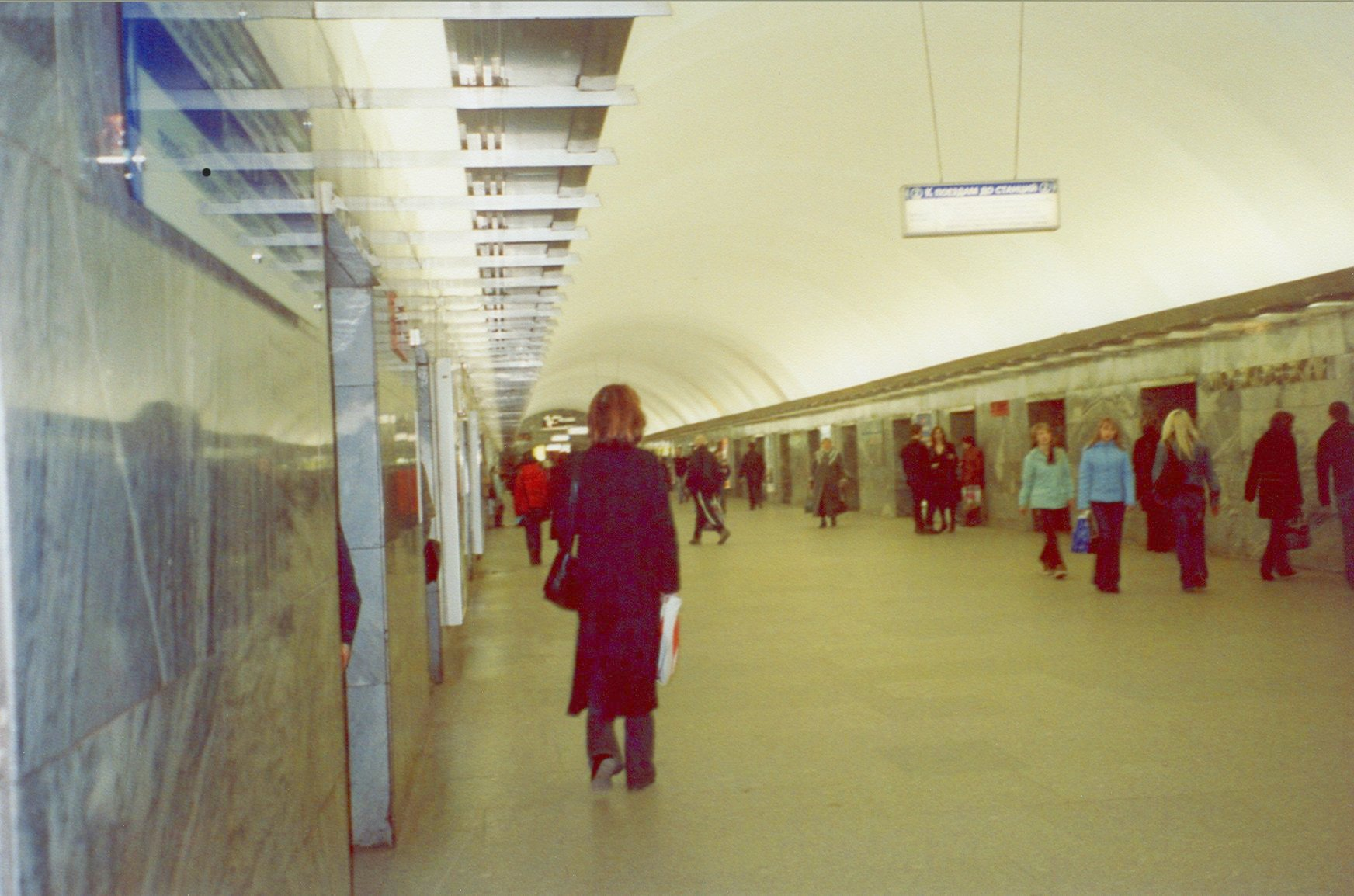 Московская